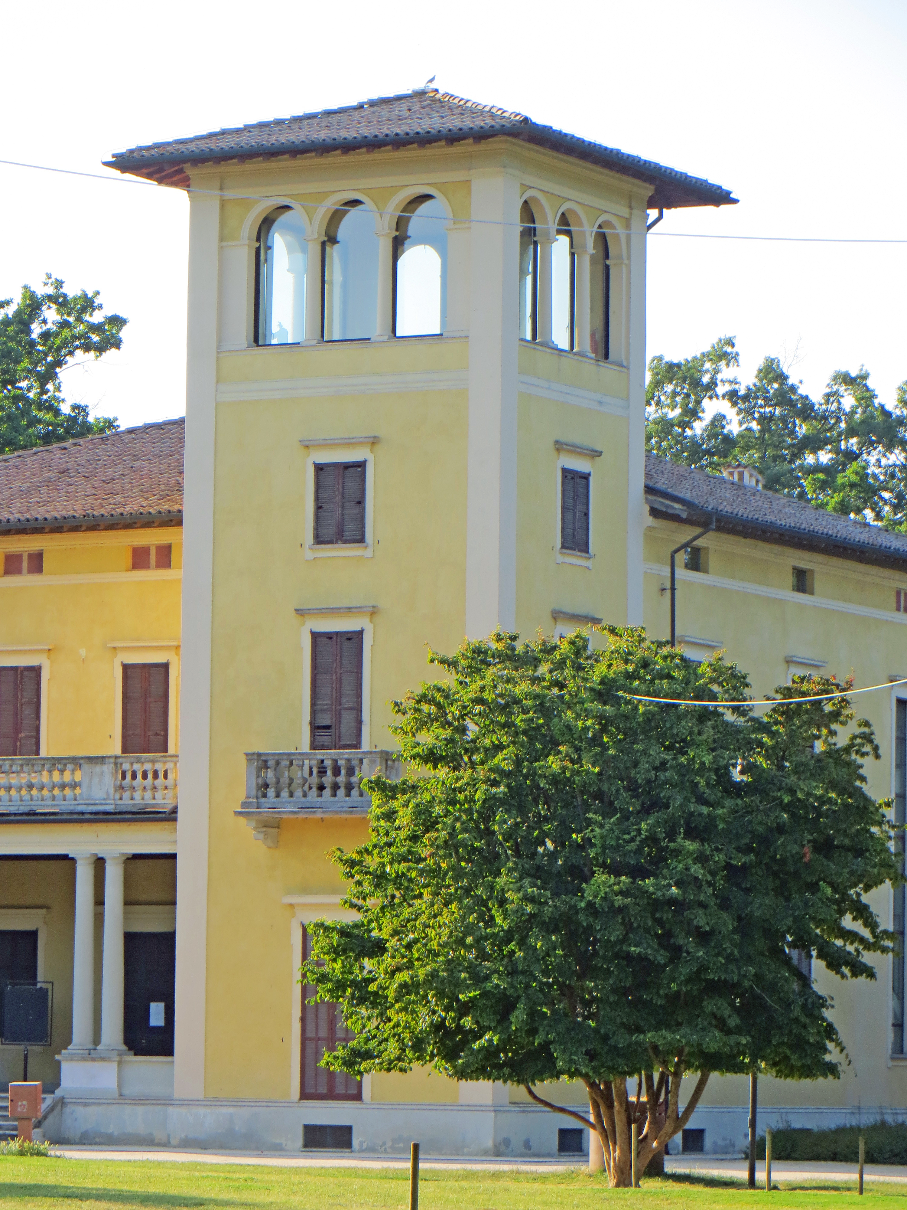 Villa Soragna (Collecchio) - torre